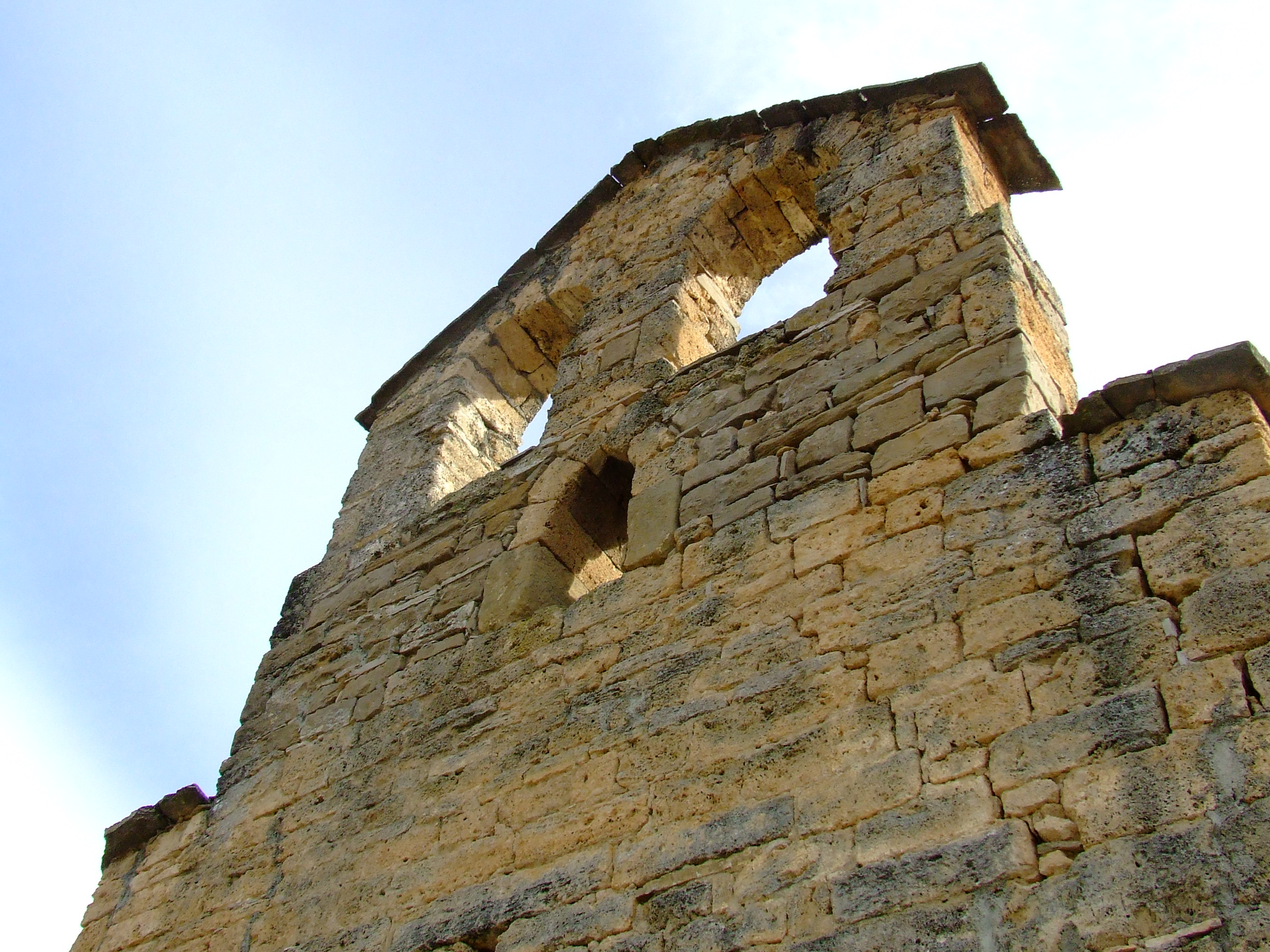 Sant Pere Màrtir de Sant Romà d'Abella (Isona i Conca Dellà, Pallars Jussà)